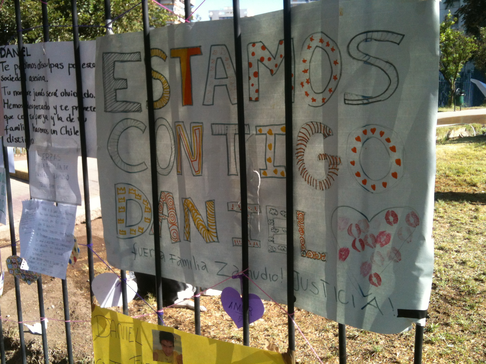 Muestras de cariño a Daniel Zamudio fuera de la Posta Central de Santiago, Chile.